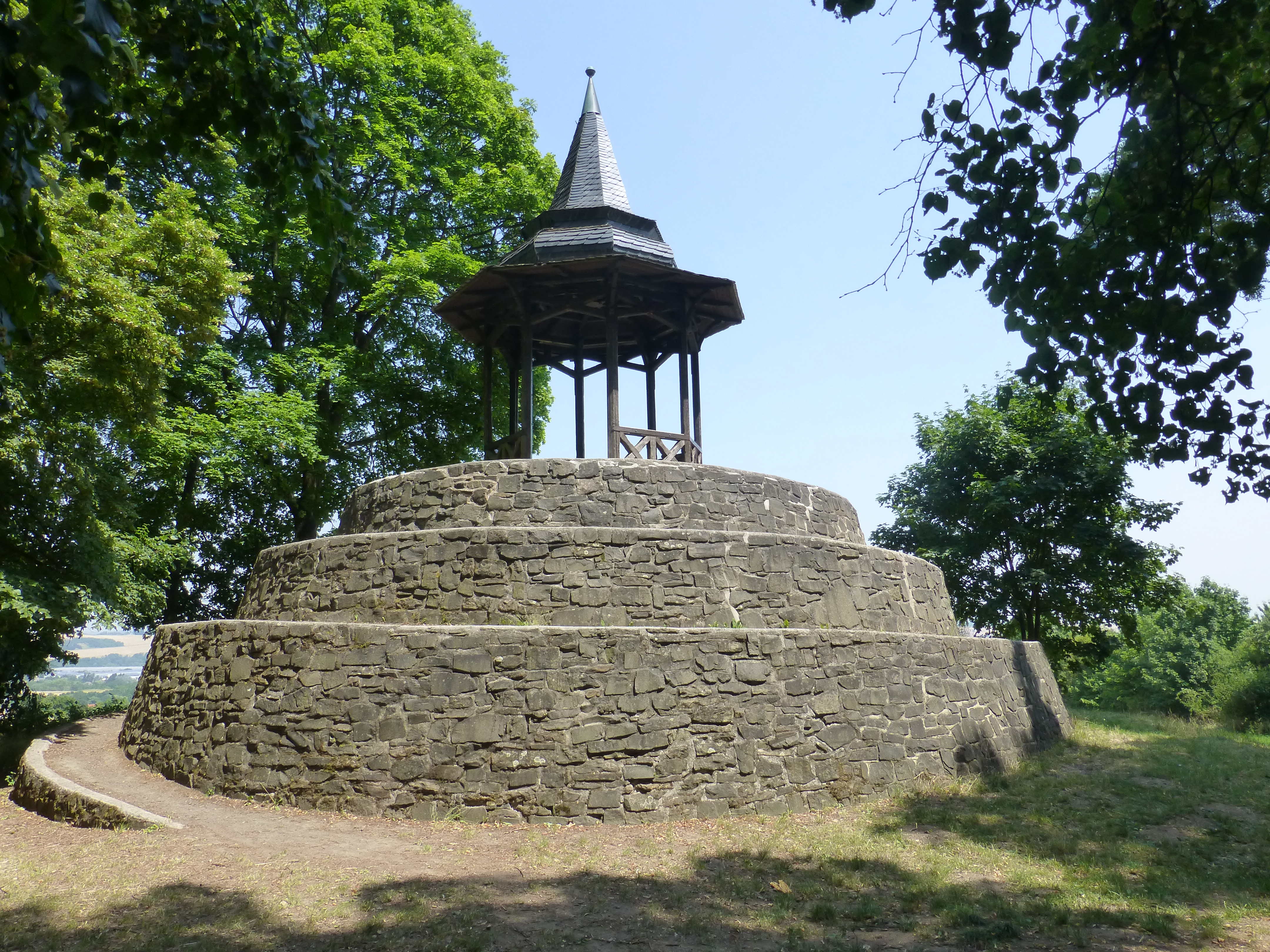 Das Schneckentürmchen